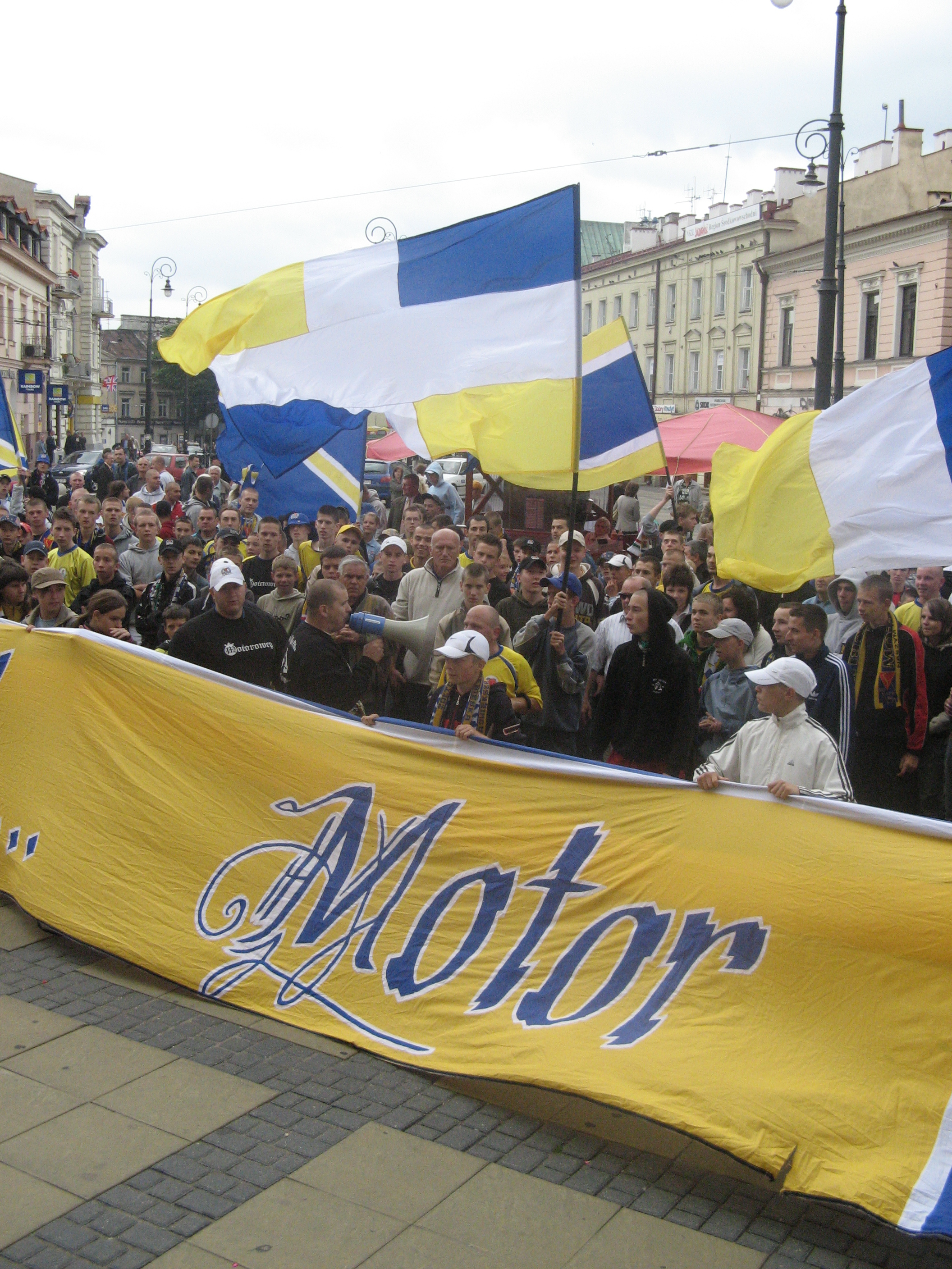 Protest kibiców Motoru Lublin pod Nowym Ratuszem w Lublinie.